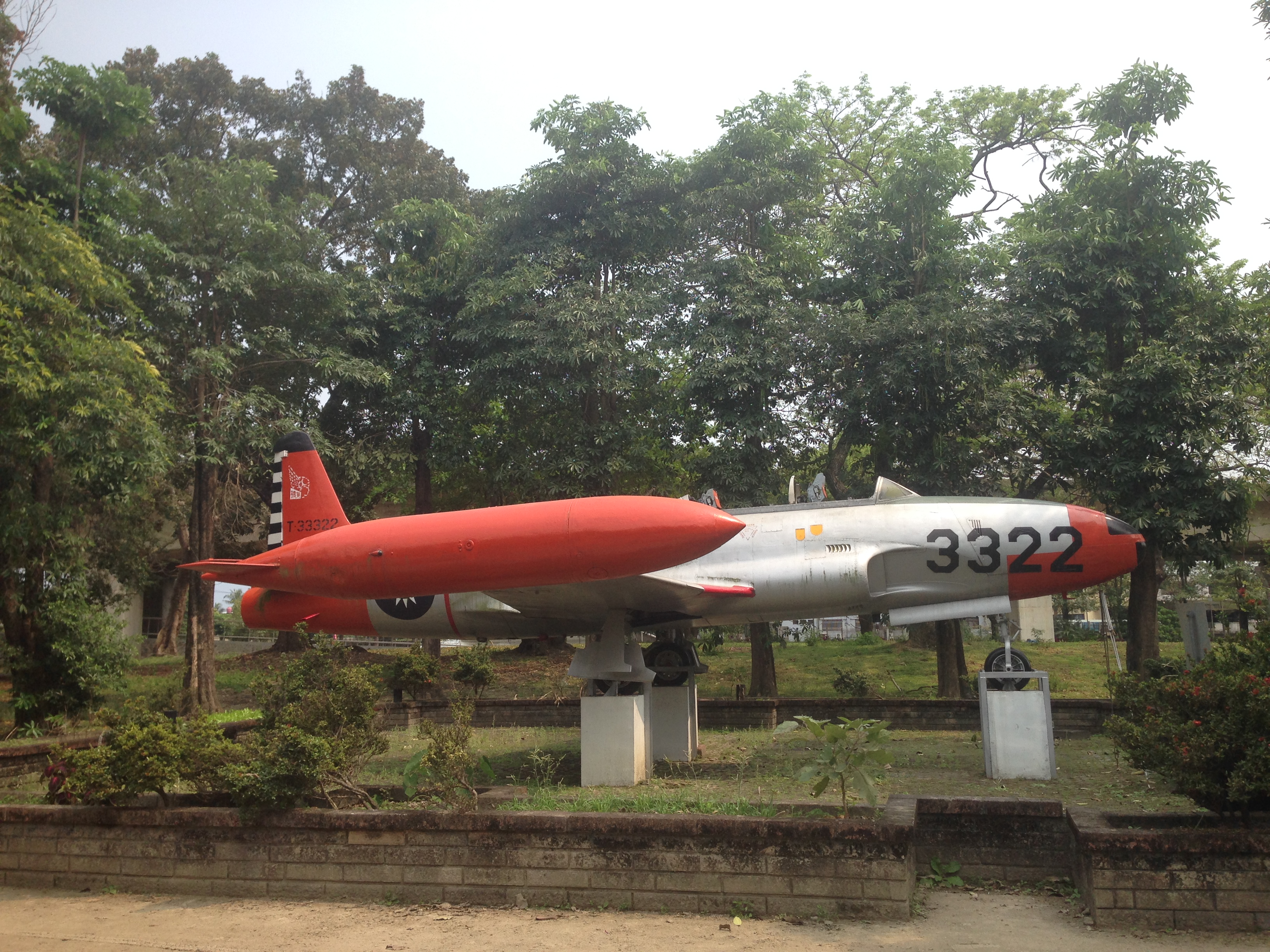 中文（台灣）: 麟洛運動公園展示的中華民國空軍T-33A教練機。